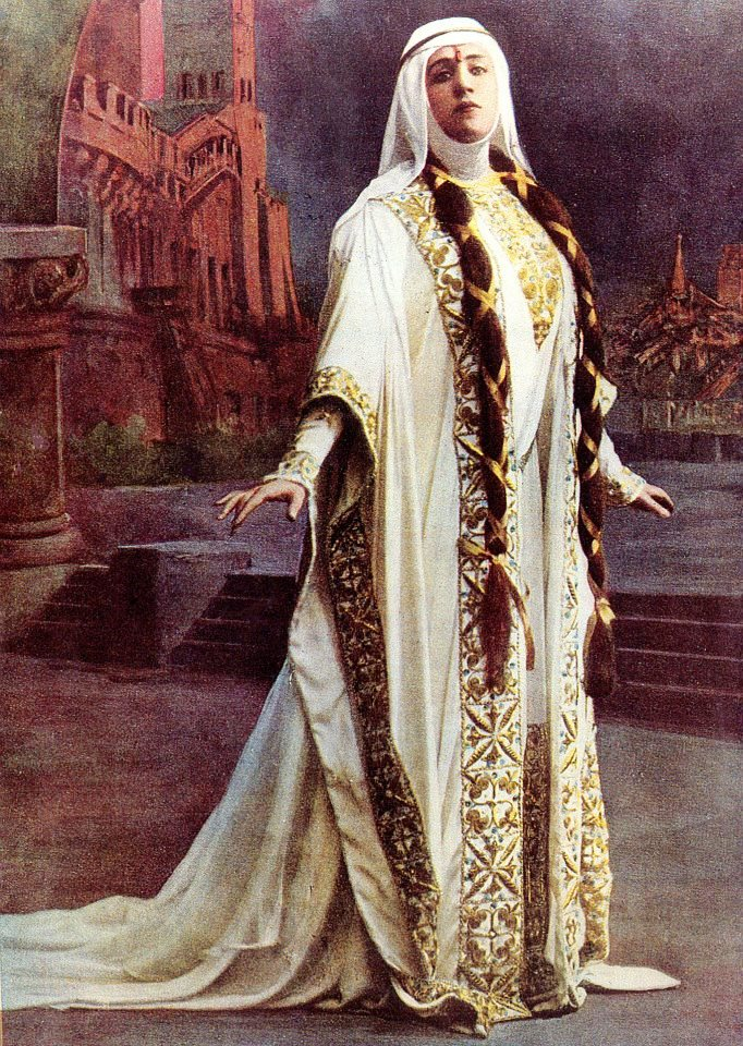 Isabeau